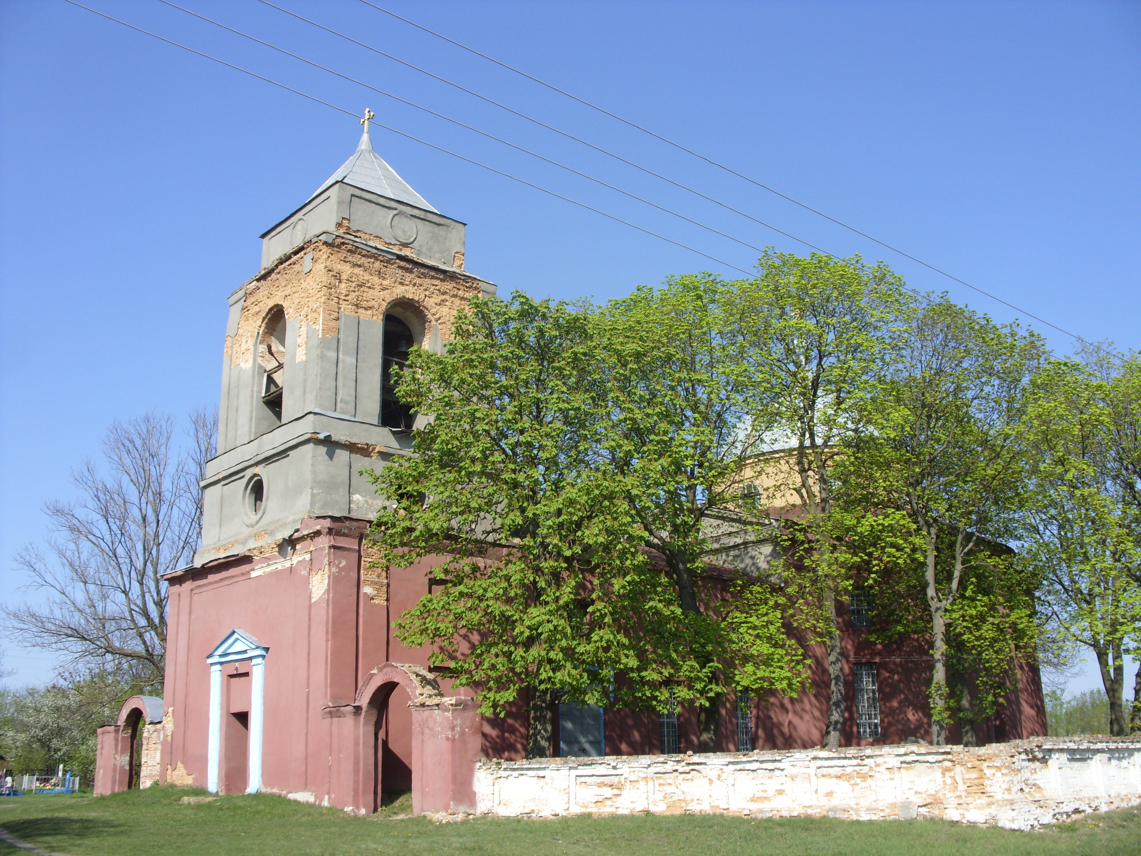 1812 р. Адреса: Білопільський район с. Куянівка.